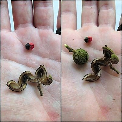 Sementes de Tabocuva